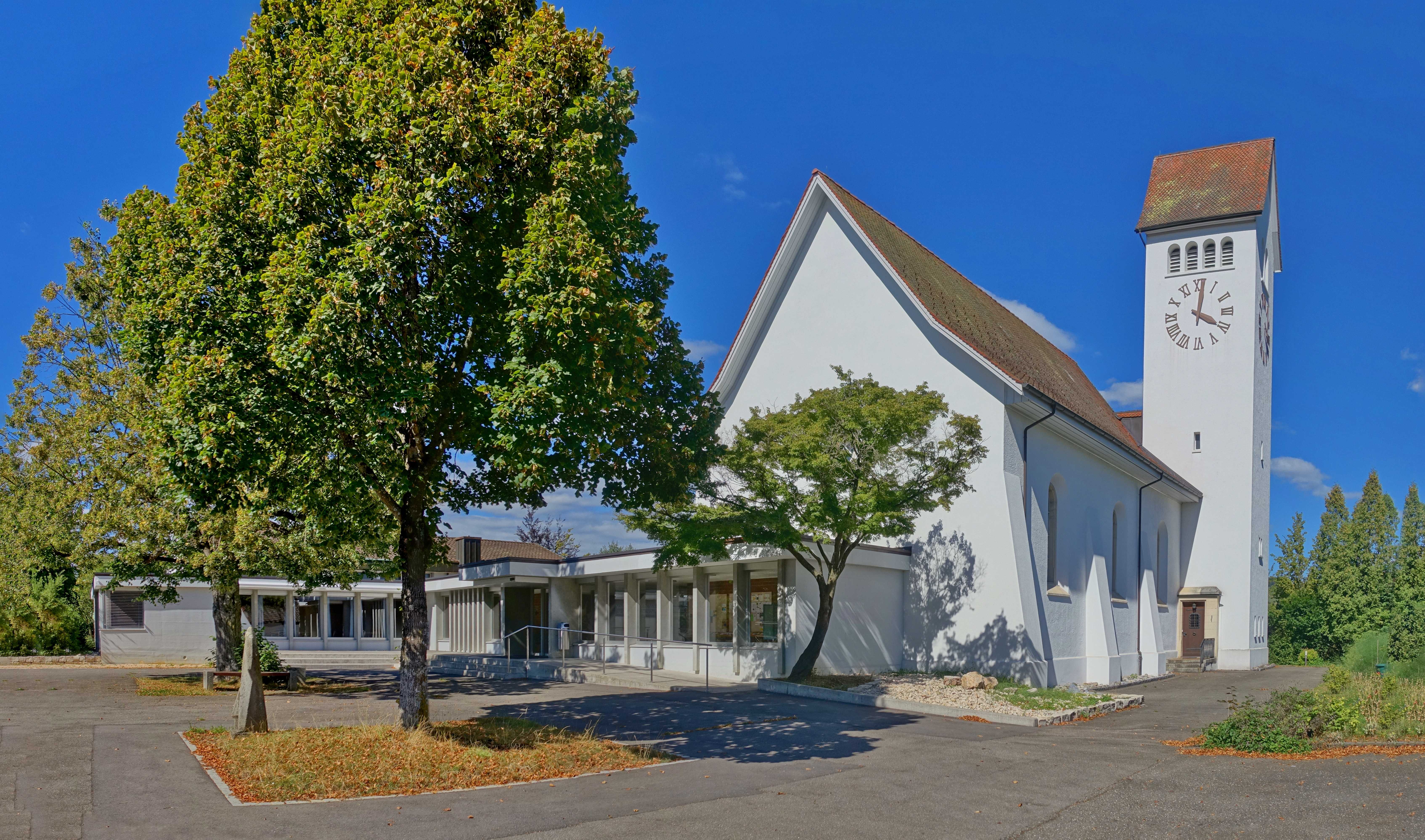 Reformierte Kirche